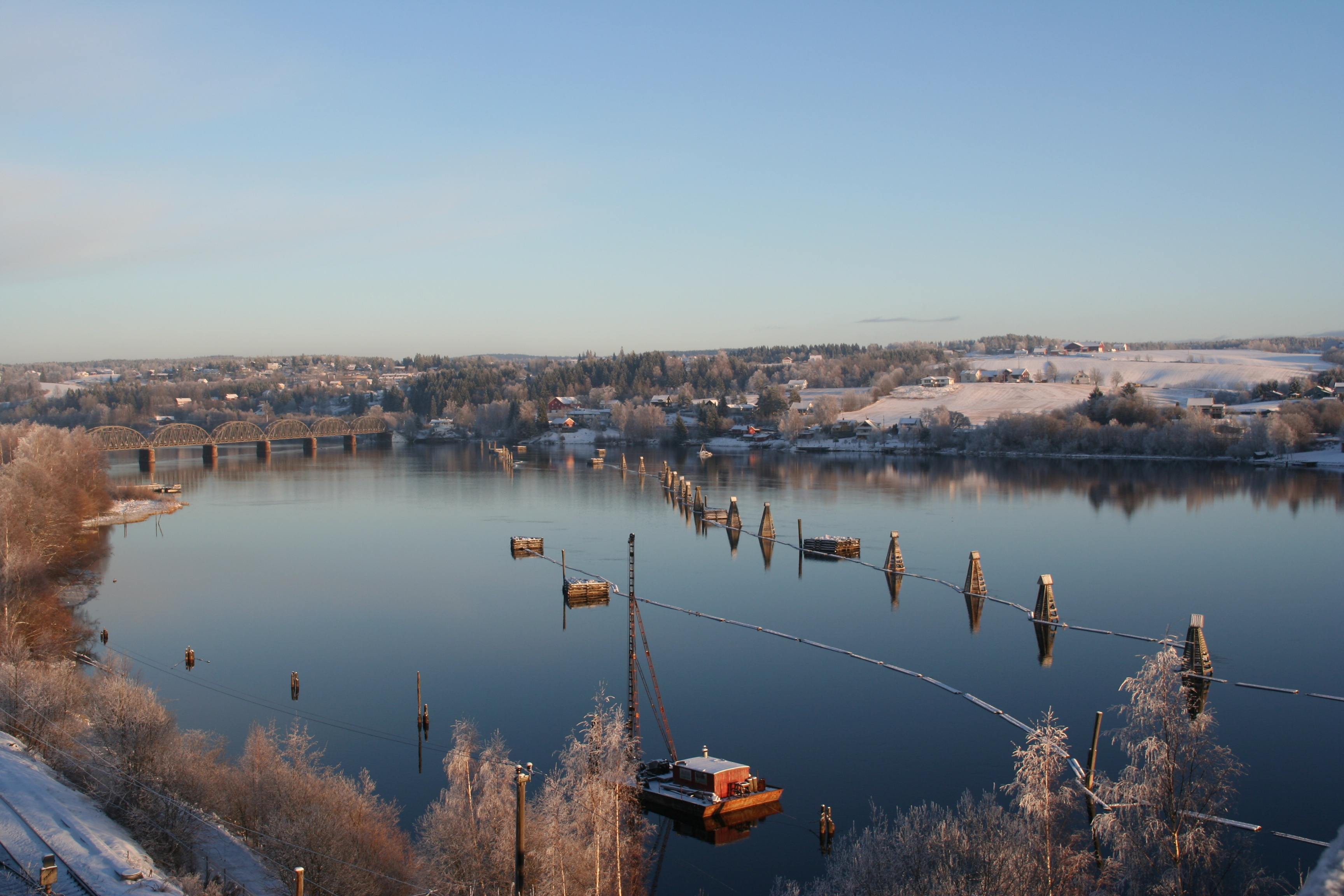 Lensene i desembersol